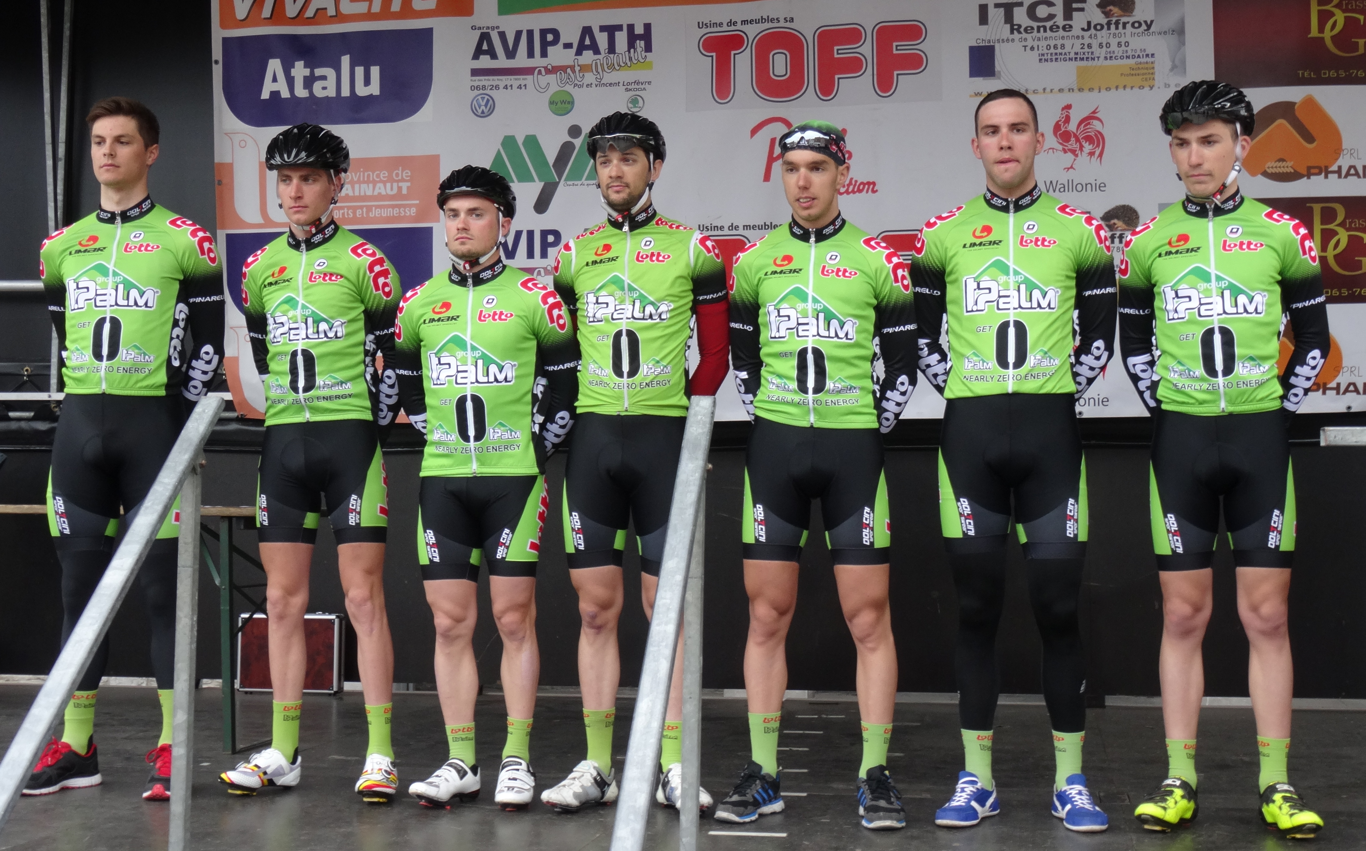 Triptyque des Monts et Châteaux 2014, étape 1, 4 avril 2014, départ d'Antoing. Depicted team: T.Palm-Pôle Continental Wallon The creation of these files was made possible thanks to the organizers of the Triptyque des Monts et Châteaux 2014 English | français | +/−